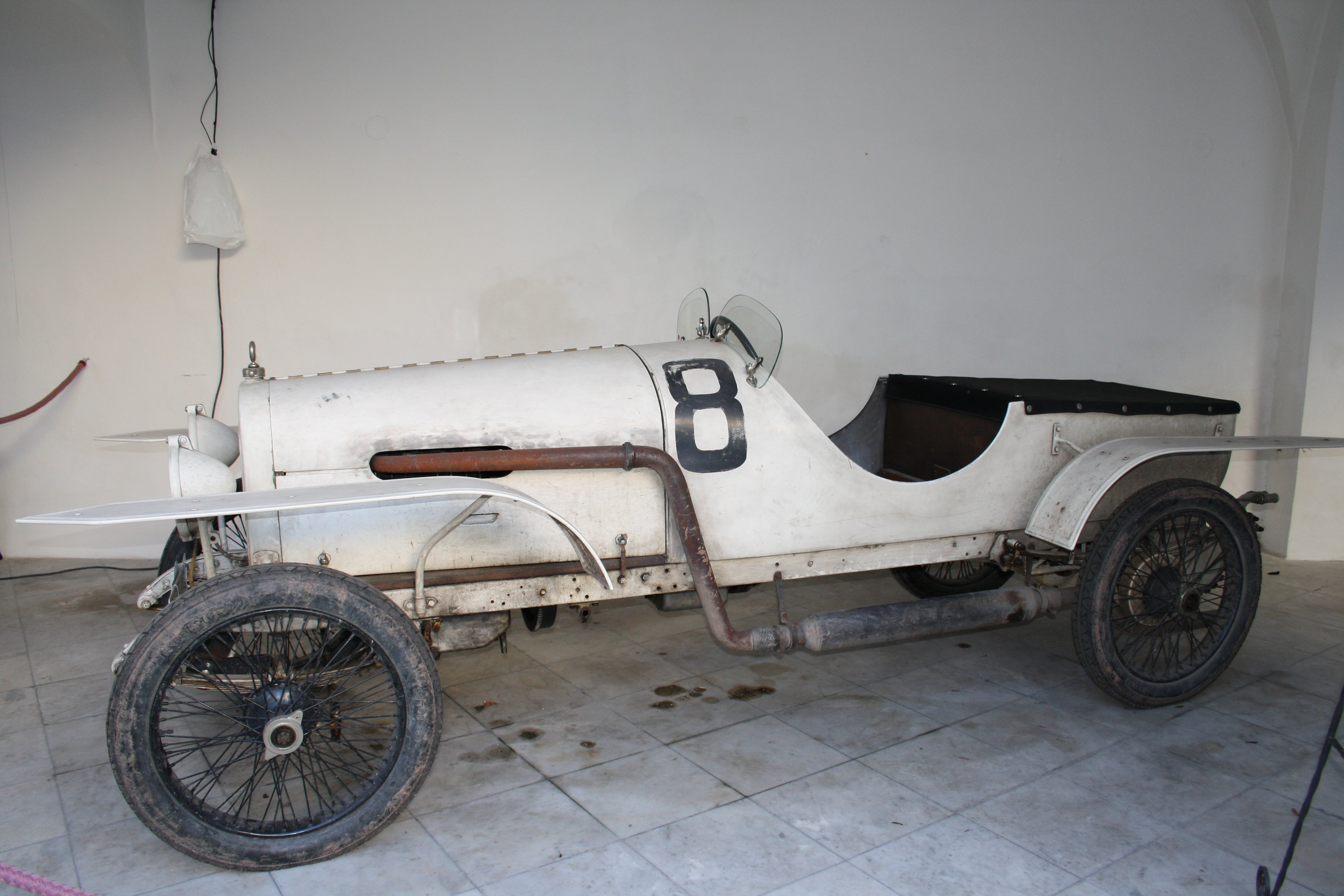 Walter WZ erbaut 1921